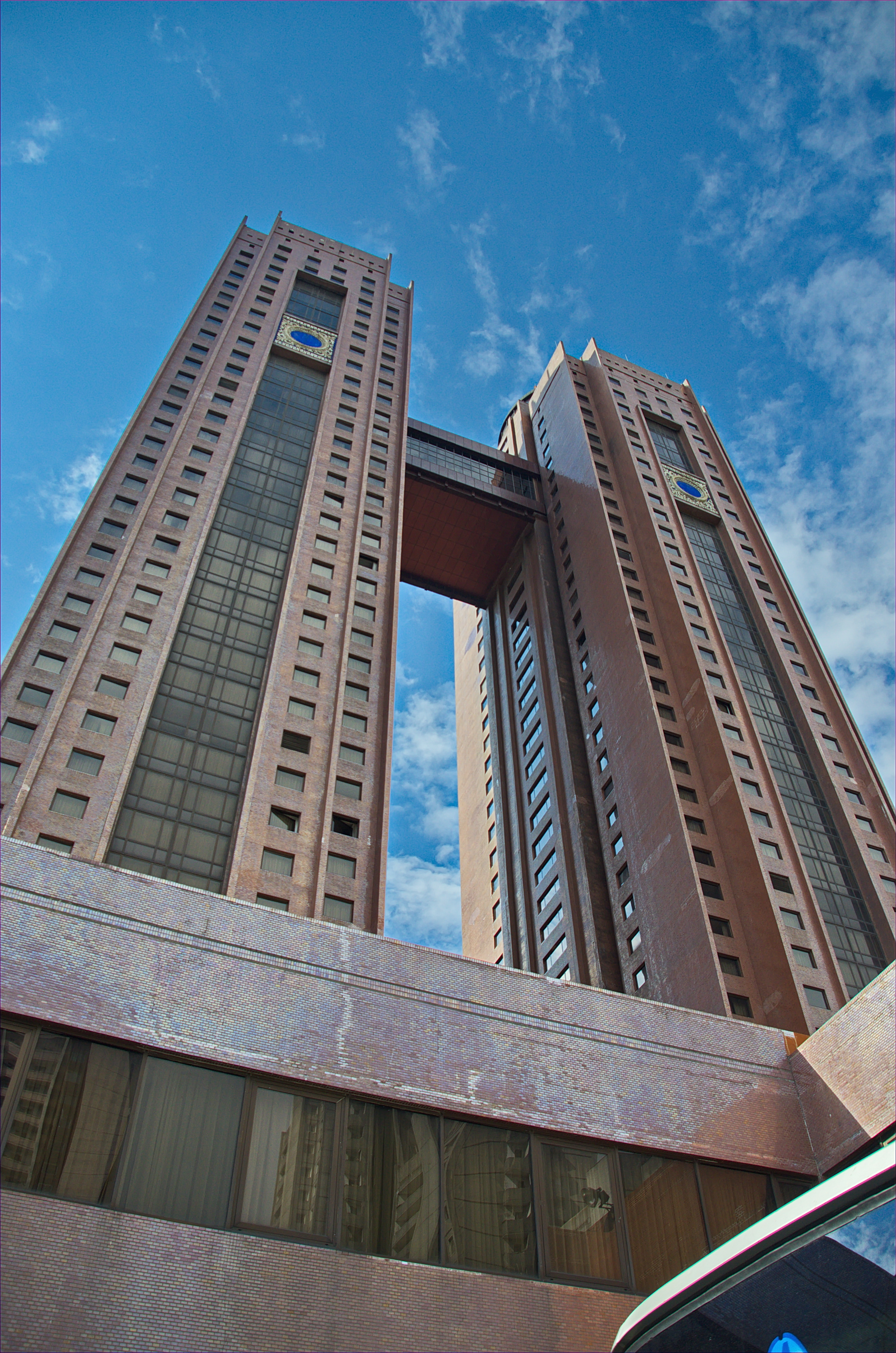 Nordkorea 2015 - Pjöngjang - Koryo Hotel